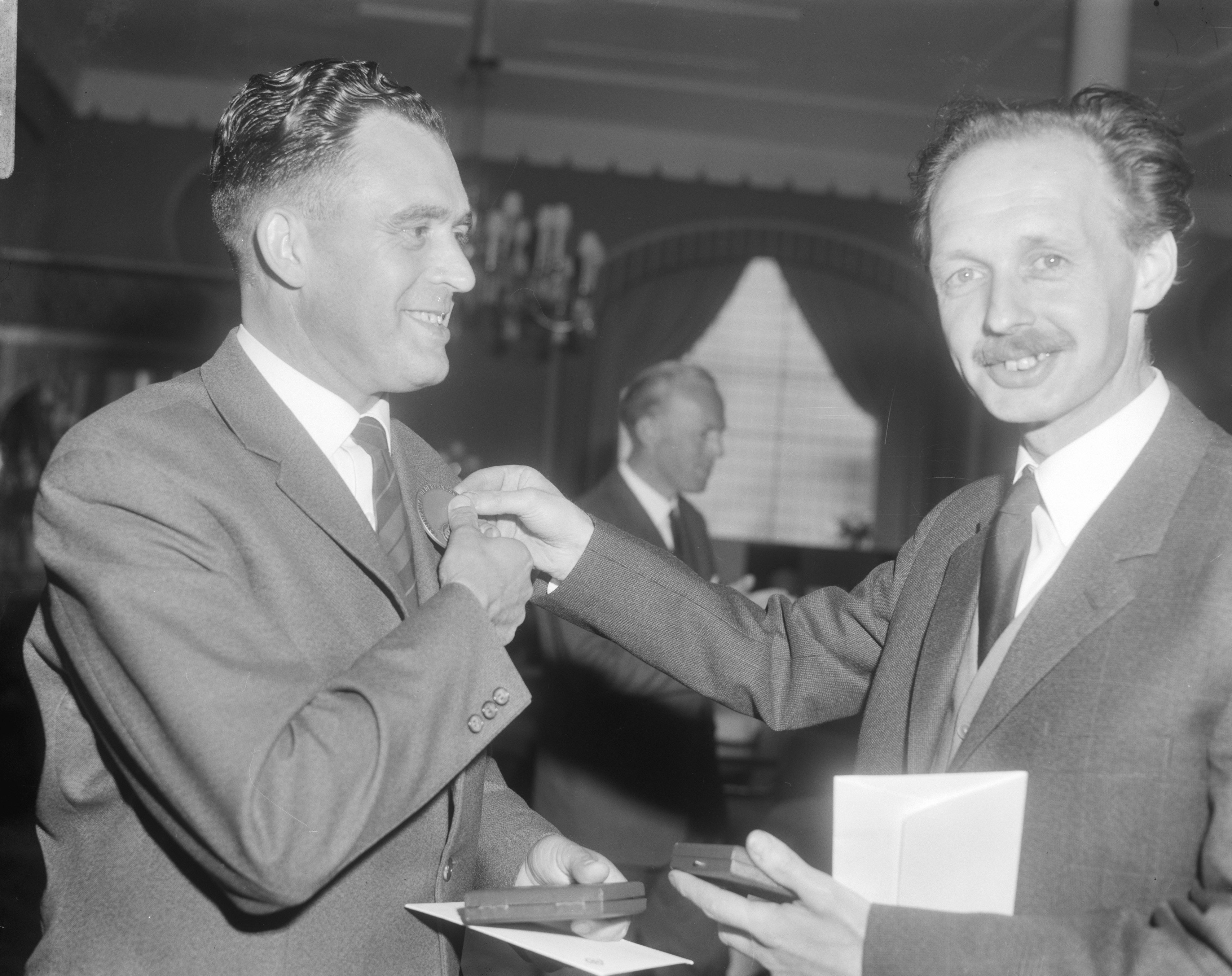 Uitreiking ANWB-prijzen te Den Haag , links H.A. Bollen (journalist) en rechts Dolf Toussaint (fotograaf)